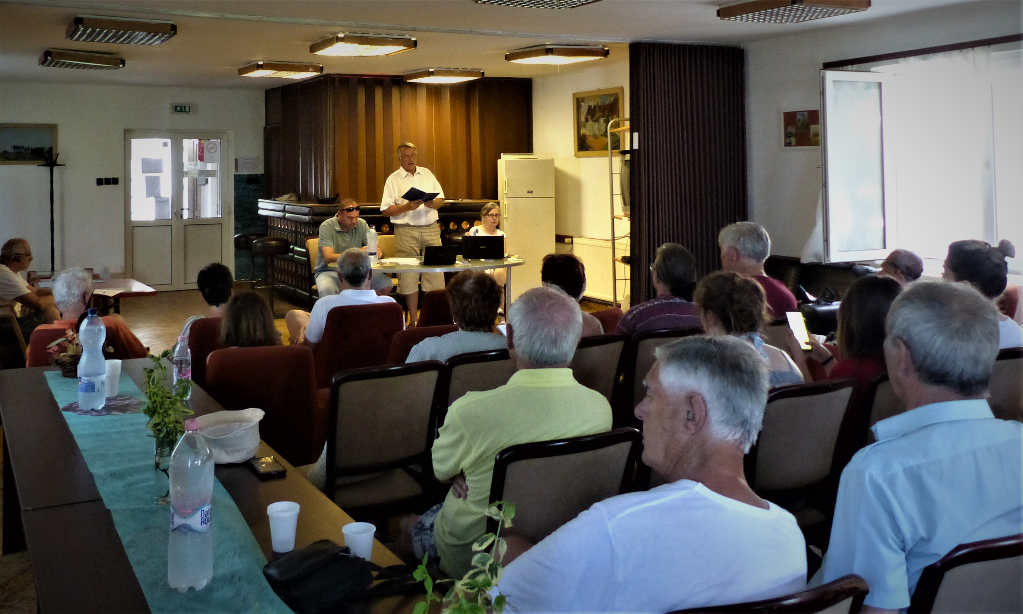 Az Alsóréti Üdülő Egyesület 2019 évi közgyűlése. A felvétel 2019. június 30-án, vasárnap készült Balatonkenesén, a Parti sétány 36 szám alatti üdülőben. Horváth József, az Egyesület Elnökének beszámolója.